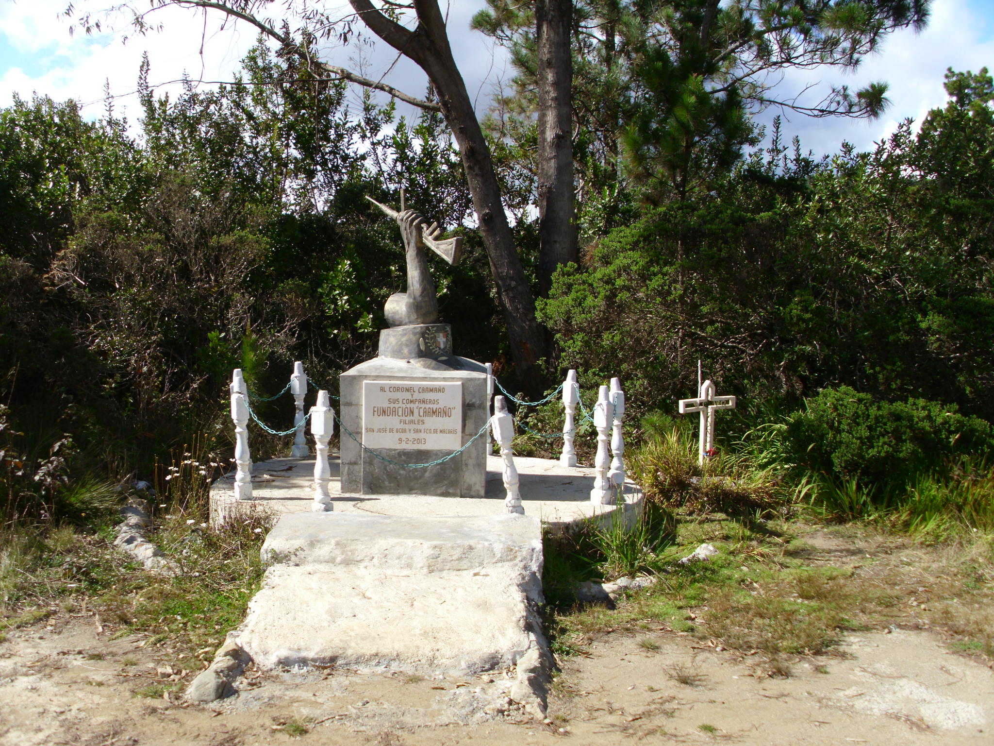 Monument voor Caamaño in het nationaal park Valle Nuevo, dicht bij de Piramide